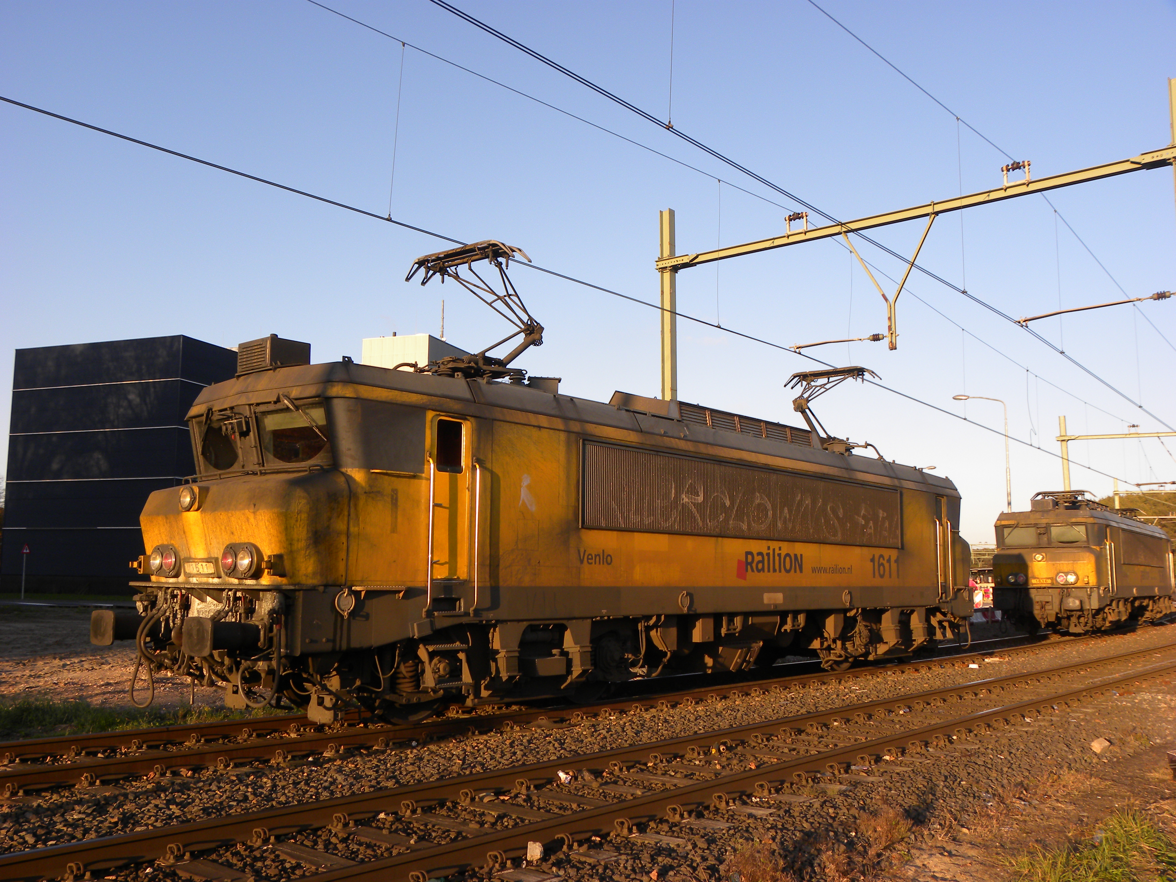 Railion 1611 beverwijk